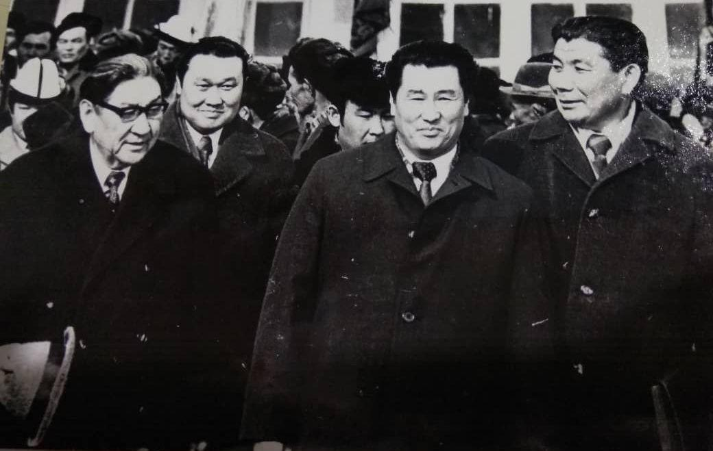 На фотографии Бейше Жапарович с Арстанбеков Дуйшеевичем